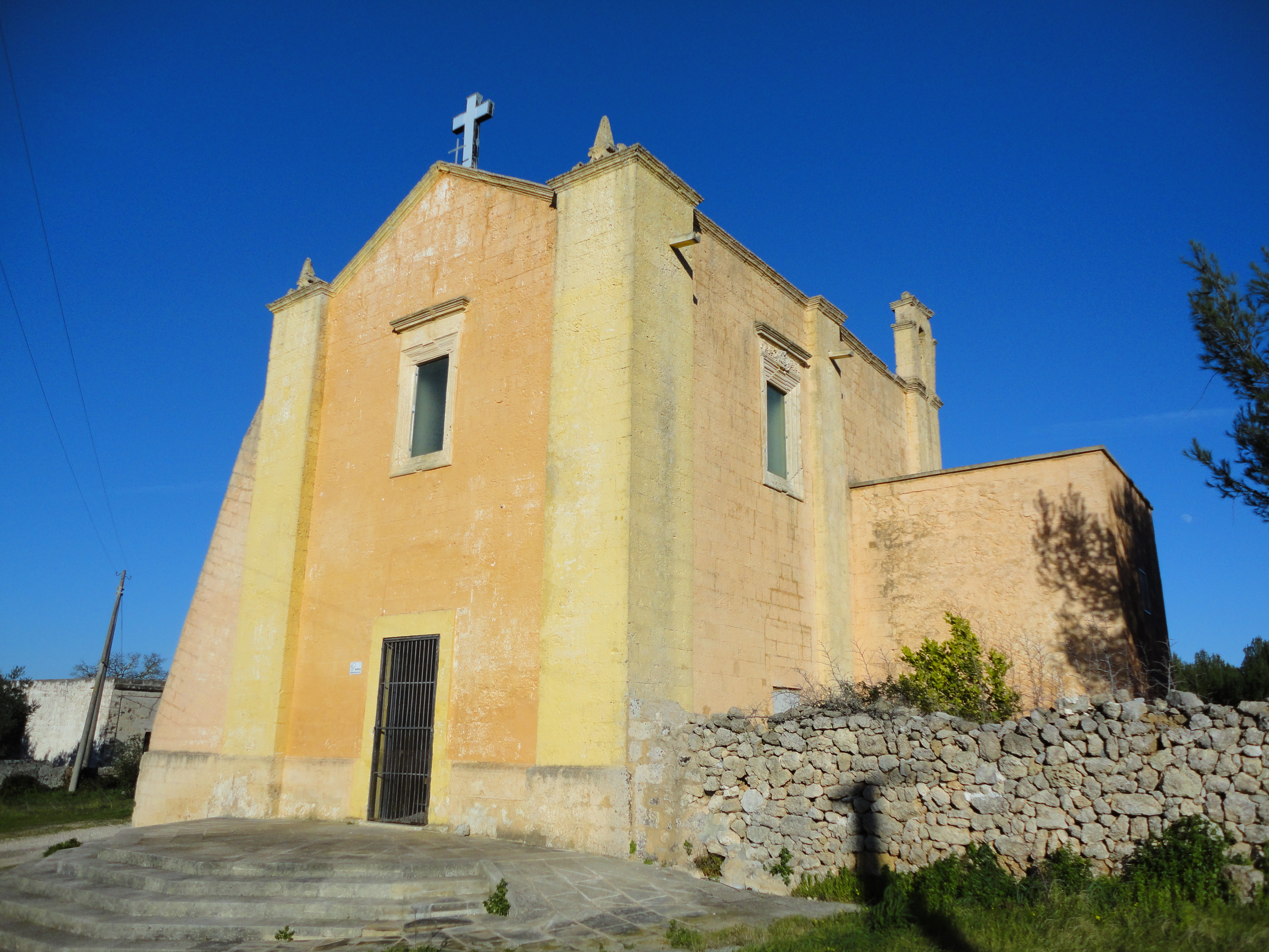 Chiesa del Crocefisso Alessano, Lecce